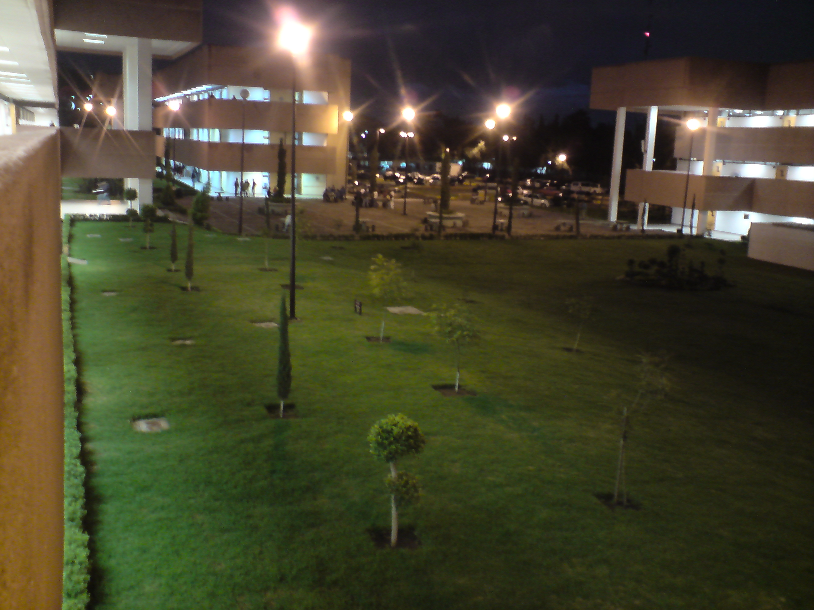 UPIITA frontal de noche.